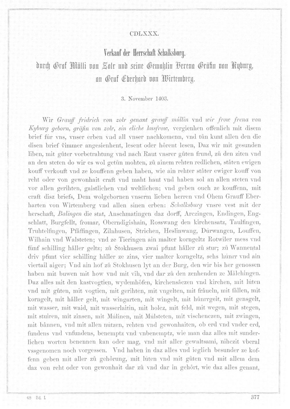 Verkauf der Herrschaft Schalksburg: Vertrag